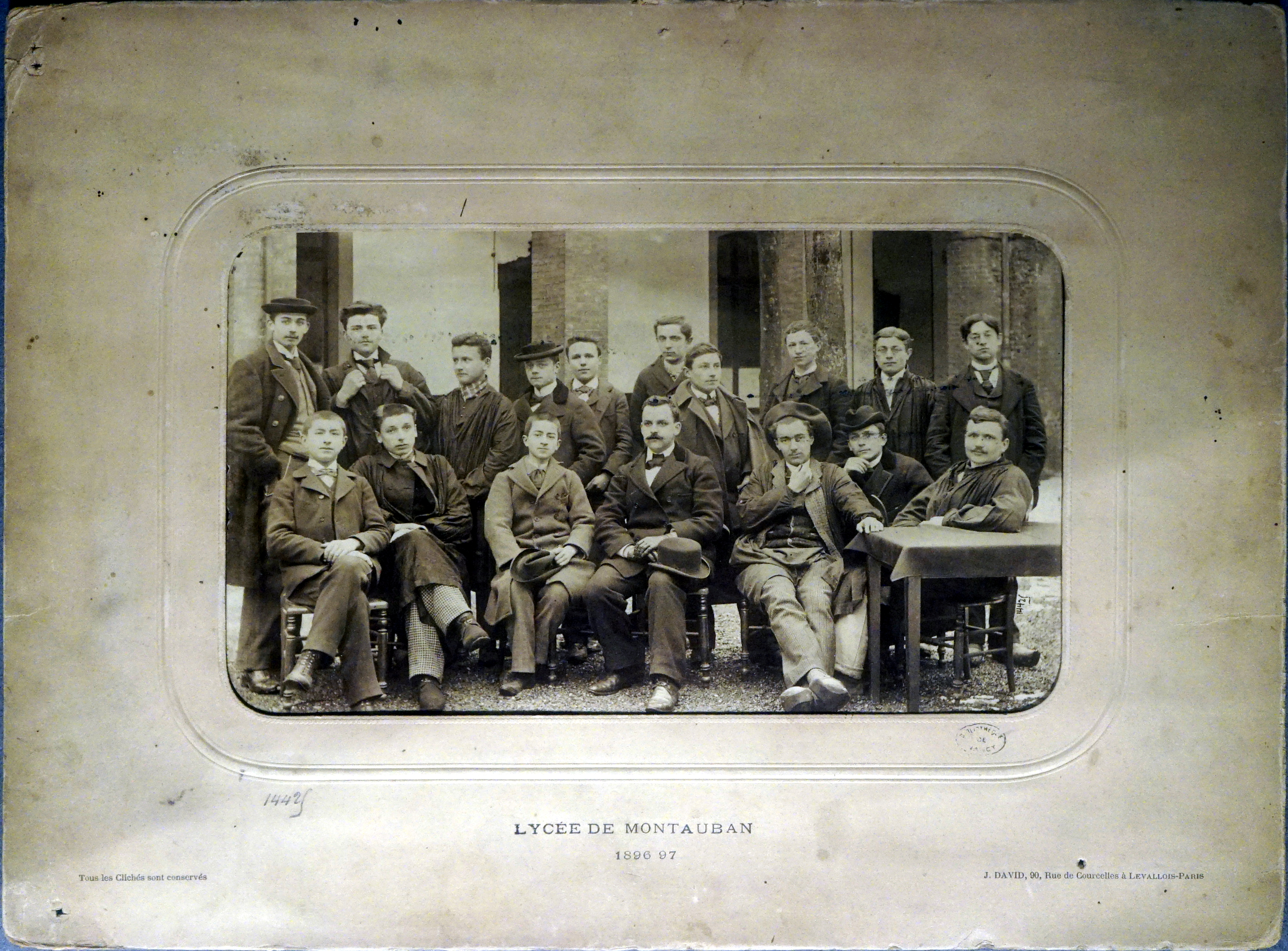 lors de l'exposition au musée de Toul, émile moselly enseignant au collège de Montauban.